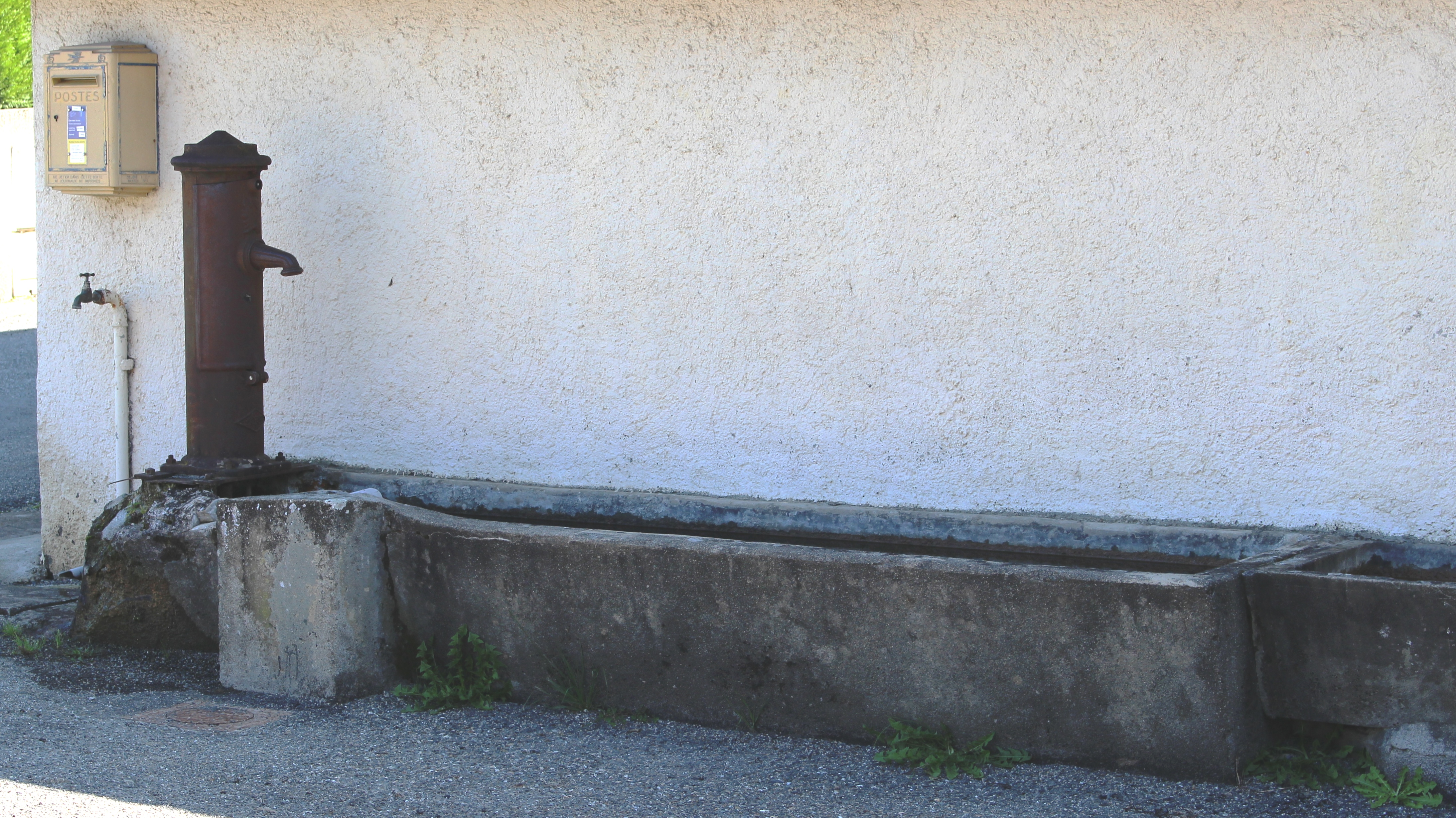 Fontaine de Gez-ez-Angles (Hautes-Pyrénées)